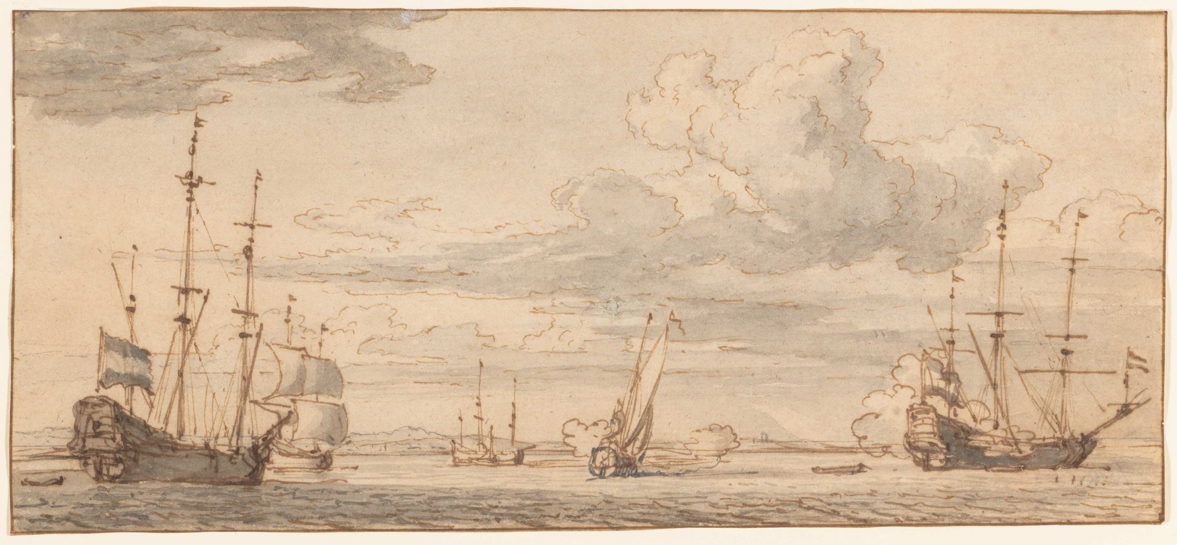 Drawing; Drawings